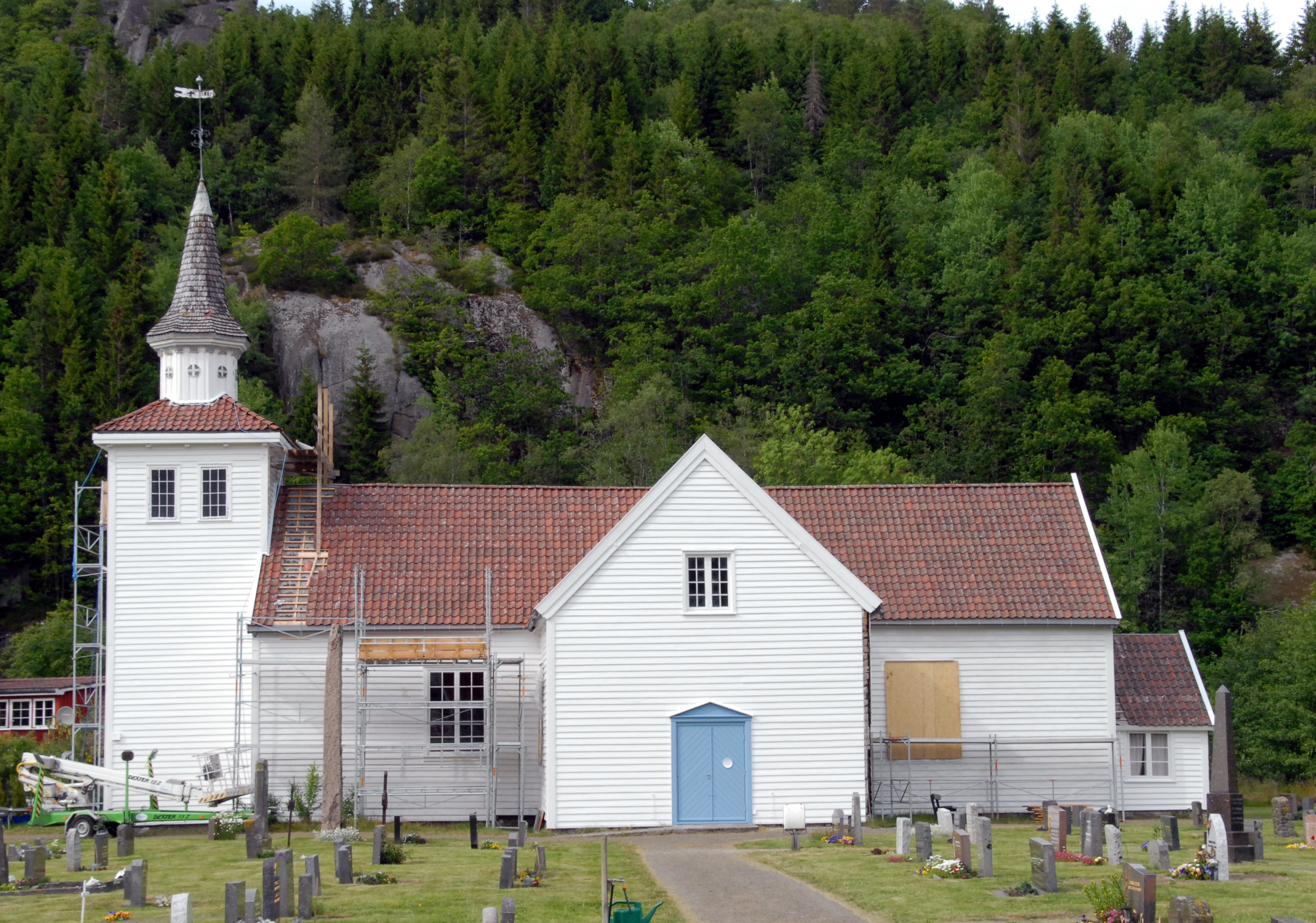 Austad_kirke